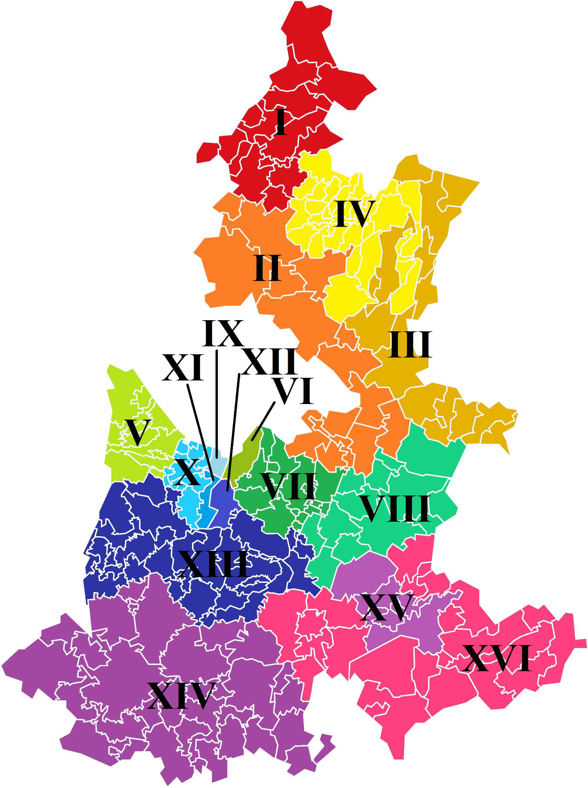 Distritos electorales federales del estado de Puebla.